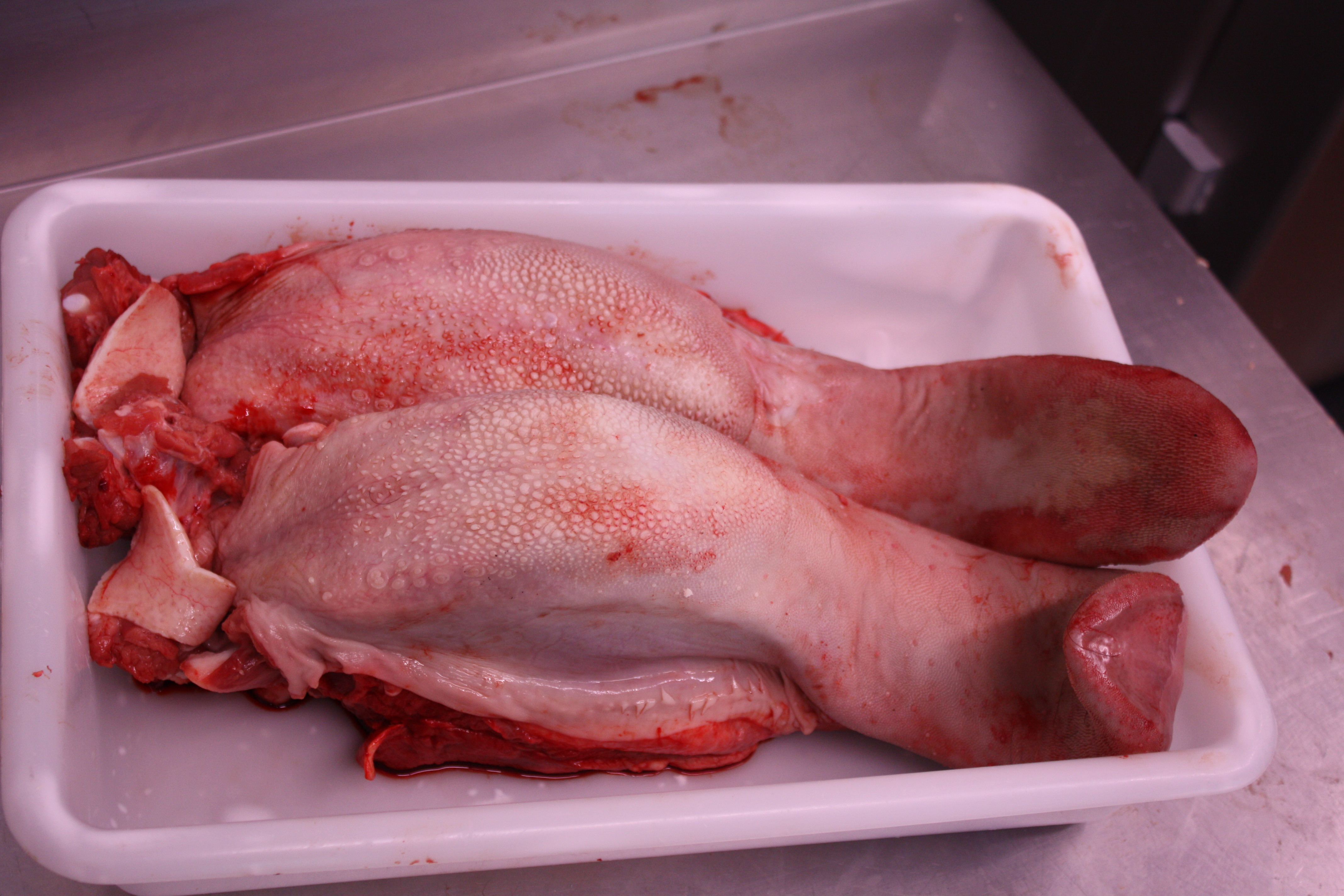 Linguas de becerra postas á venda.